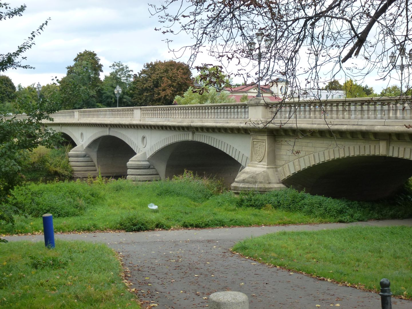 Auebrücke in Zeitz